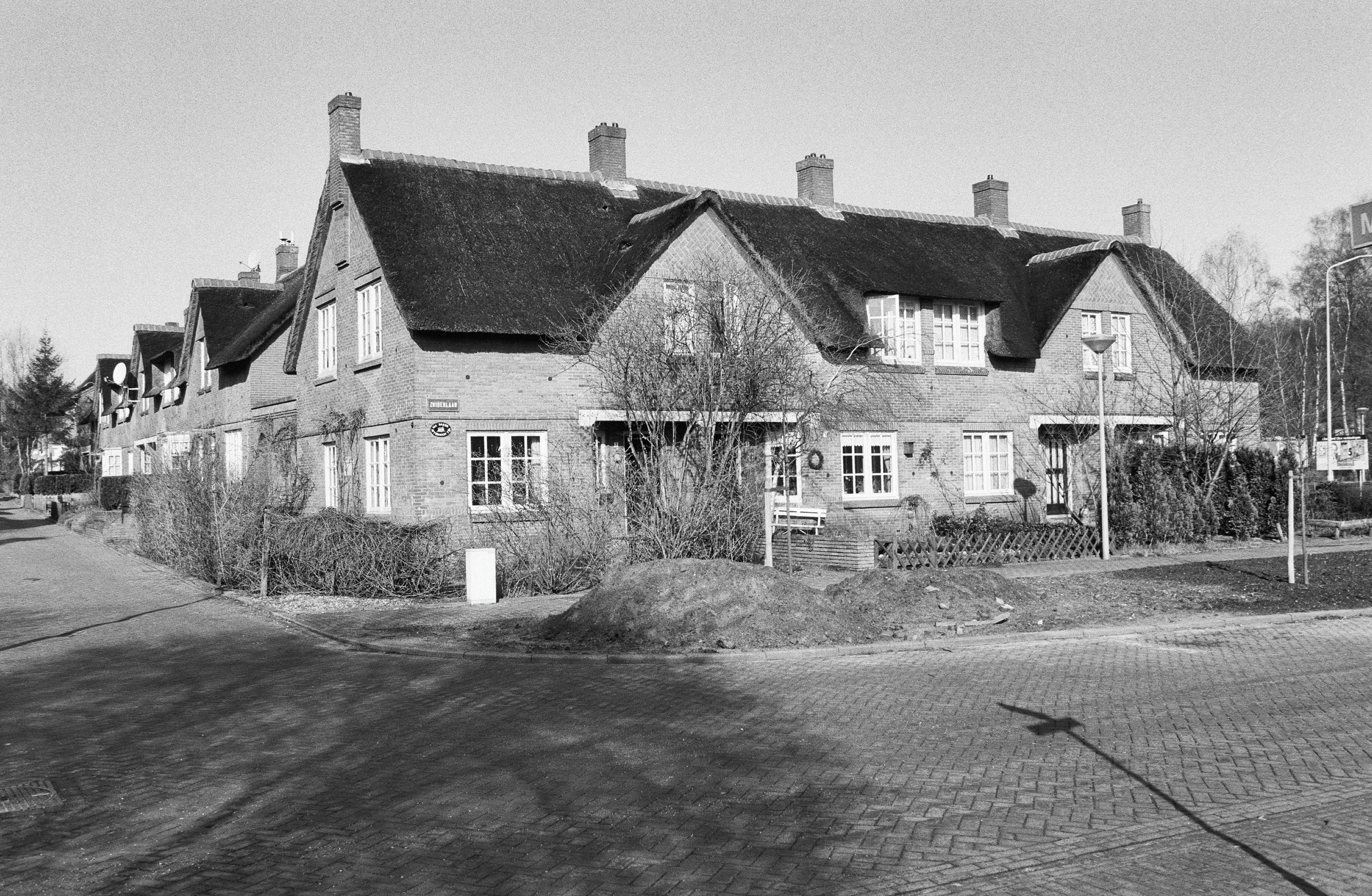 Exterieur OVERZICHT